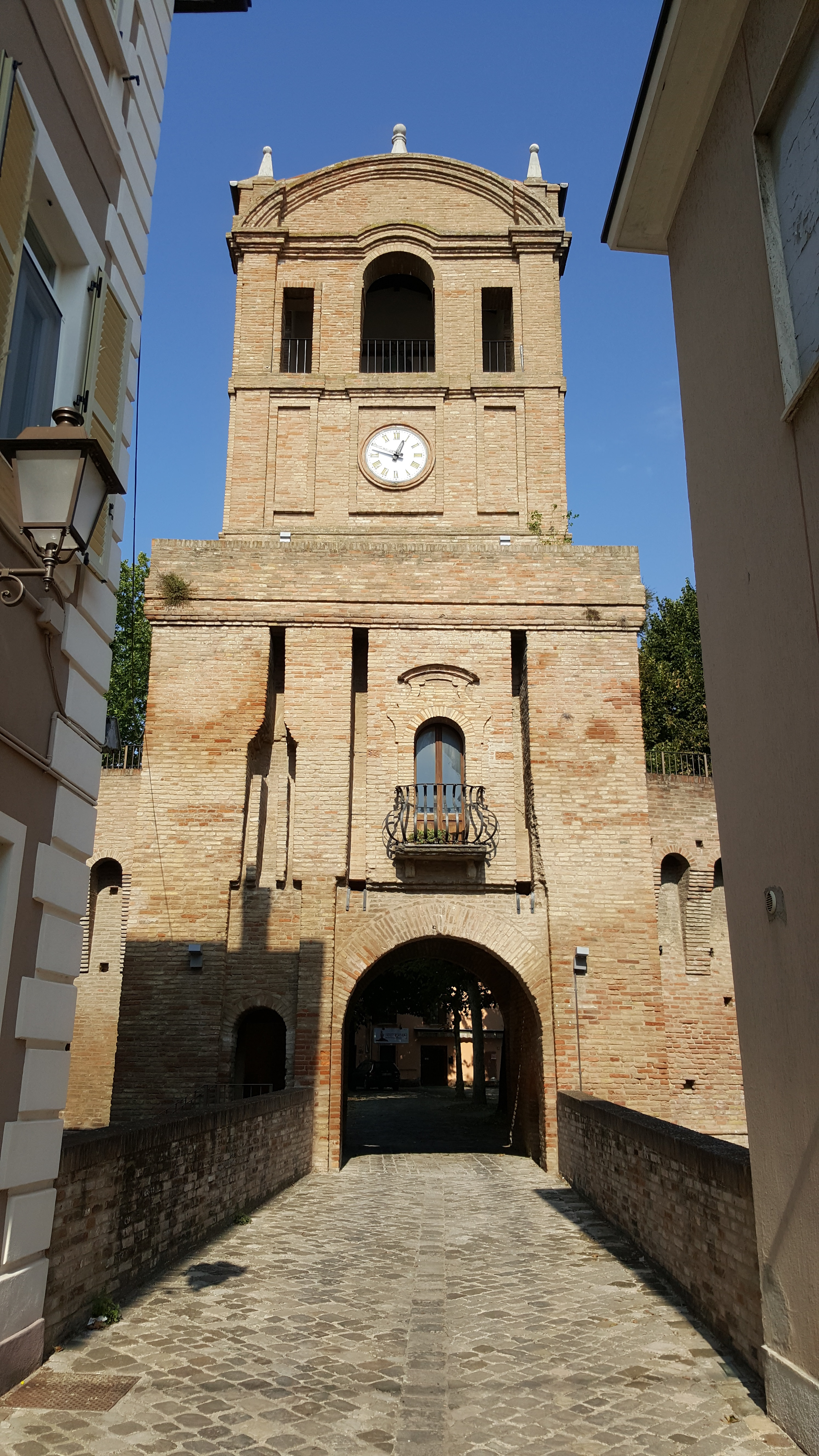 Un raro castello di pianura This is a photo of a monument which is part of cultural heritage of Italy.